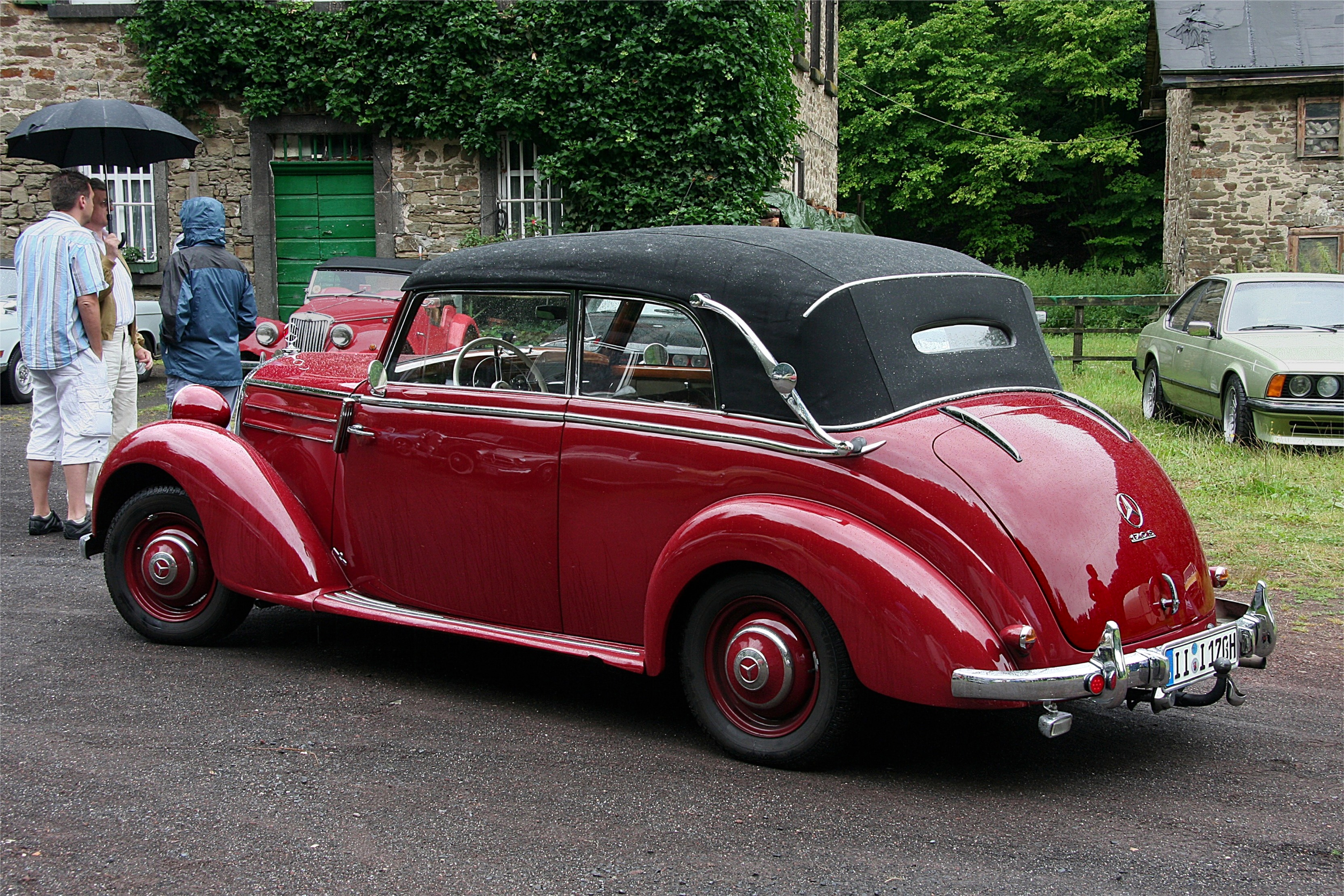 Mercedes-Benz 170 S Cabriolet B, Baujahr 1950 (Kennzeichen verändert)